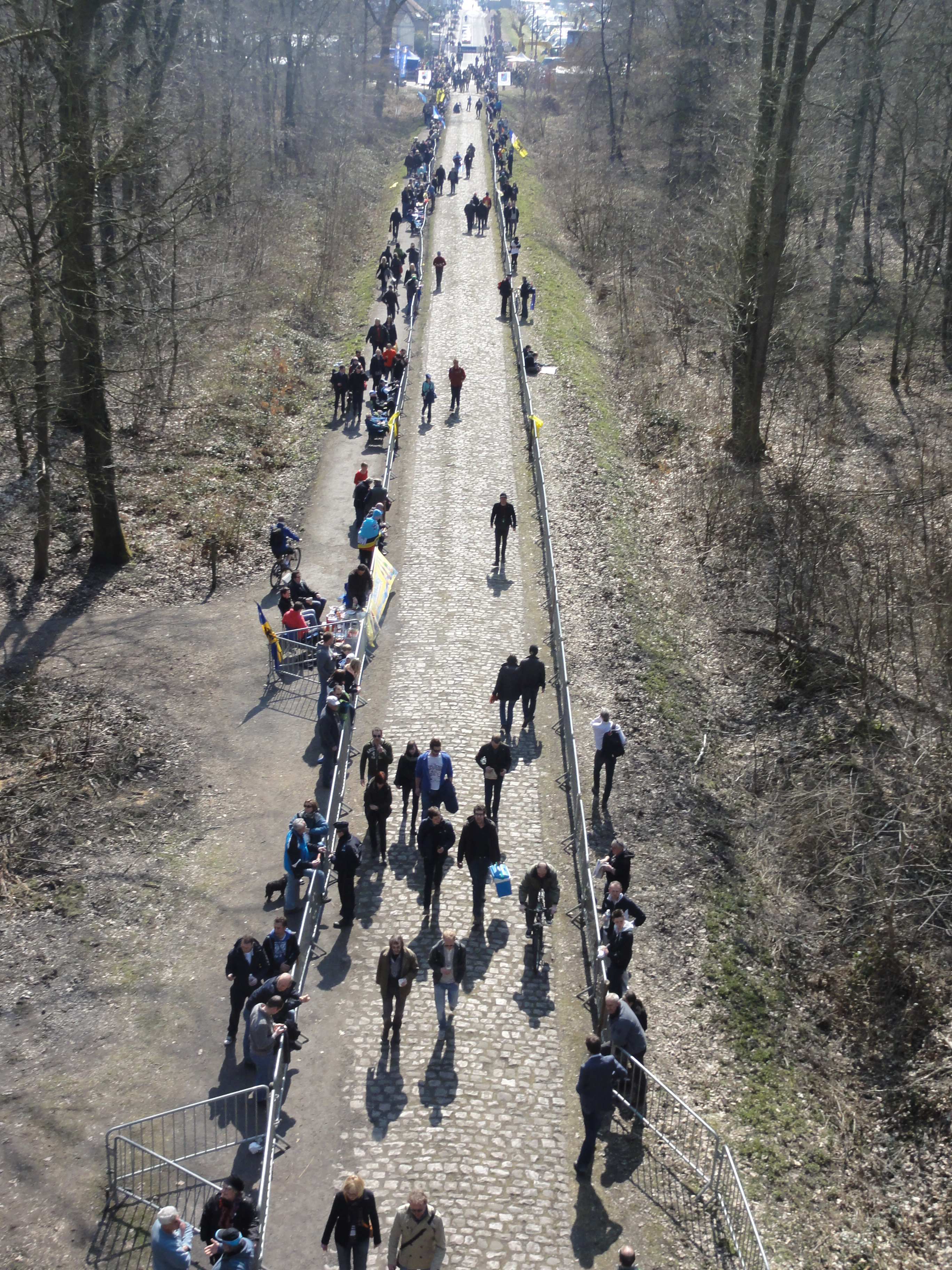 Reportage photographique réalisé le dimanche 7 avril 2013 durant l'édition 2013 du Paris-Roubaix à Wallers, Nord, Nord-Pas-de-Calais, France. Les fichiers ont été réalisés près du pont Gibus de l'ancienne ligne de Denain à Saint-Amand-les-Eaux, dans les cités de la fosse Arenberg, et à la trouée d'Arenberg.